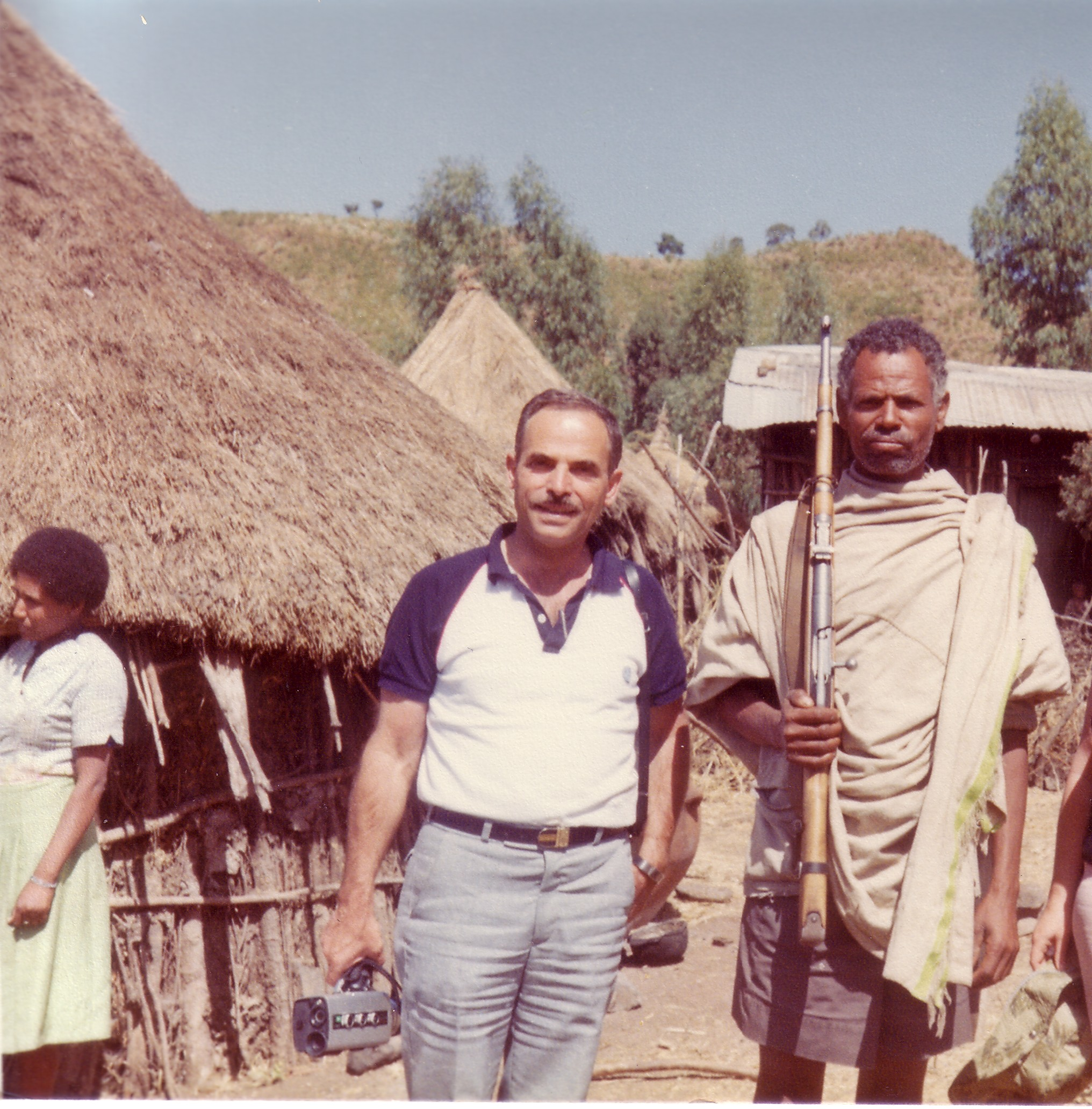 אלי אליעזרי עם לוחם אתיופי באתיופיה